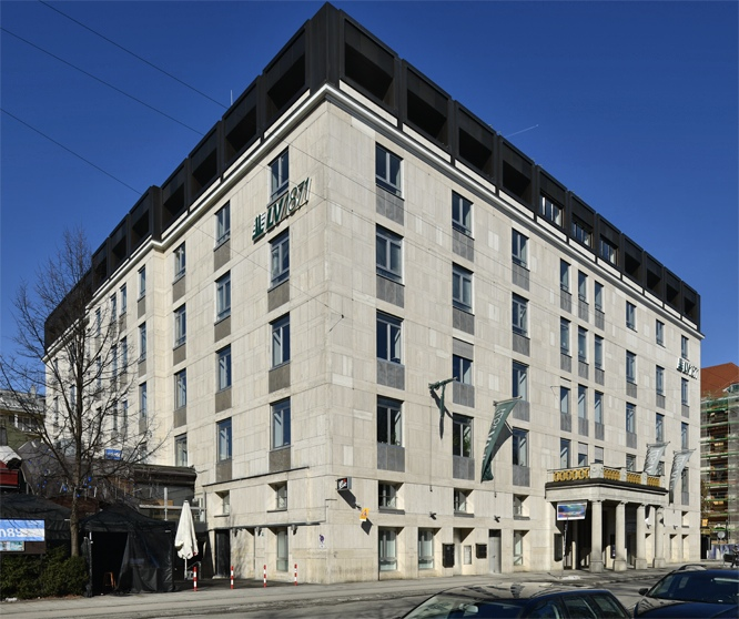 München, Maximiliansplatz 5, Fassadenansicht, ehemals Regina-Palast-Hotel Gebäude. Kein Baudenkmal. Zustand 2018.